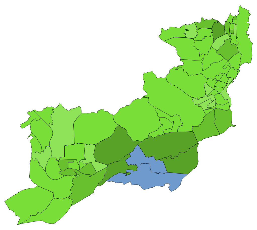 顏色對照表